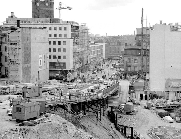 Den provisoriska Klarabergsgatan västerut mot Drottninggatan